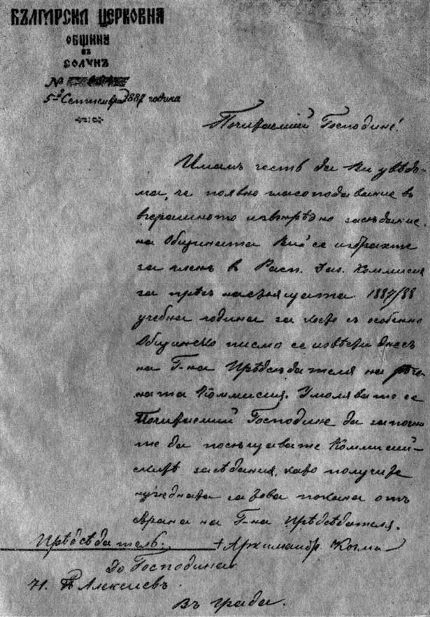 Писмо на Козма Дебърски (1835 - 1916) до Никола Алексиев. БЪЛГАРСКА ЦЕРКОВНА ОБЩИНА В СОЛУН No. 254 5-й Септемврий 1887 година Почитаемий Господине! Имам чест да Ви уведомя, че по явно гласоподавание във вчерашното извънредно заседание на Общината Вий се избрахте за член в Расп. Д. Комисия за през настоящата 1887-88 учебна година за което с особенно Общинско писмо се извести днес на Г-на Председателя на речената Комисия. Умолявате се Почитаемий Господине да започнете да посещавате Комисийските заседания, като получите нужната за това покана от страна на Г-на Председателя. Председател: Архимандр. Козма До Господина Н. П. Алексиев. В града.